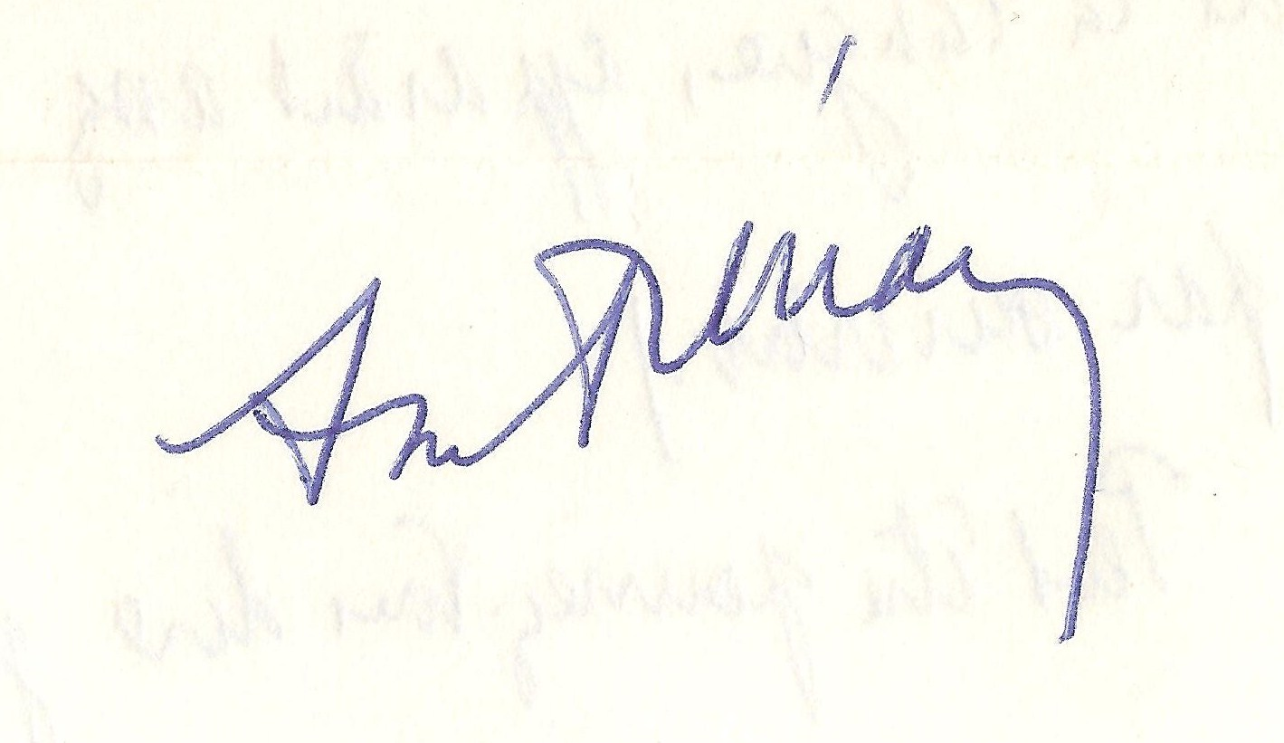 Signature du poète français André Frénaud (d'une lettre à l'utilisateur)